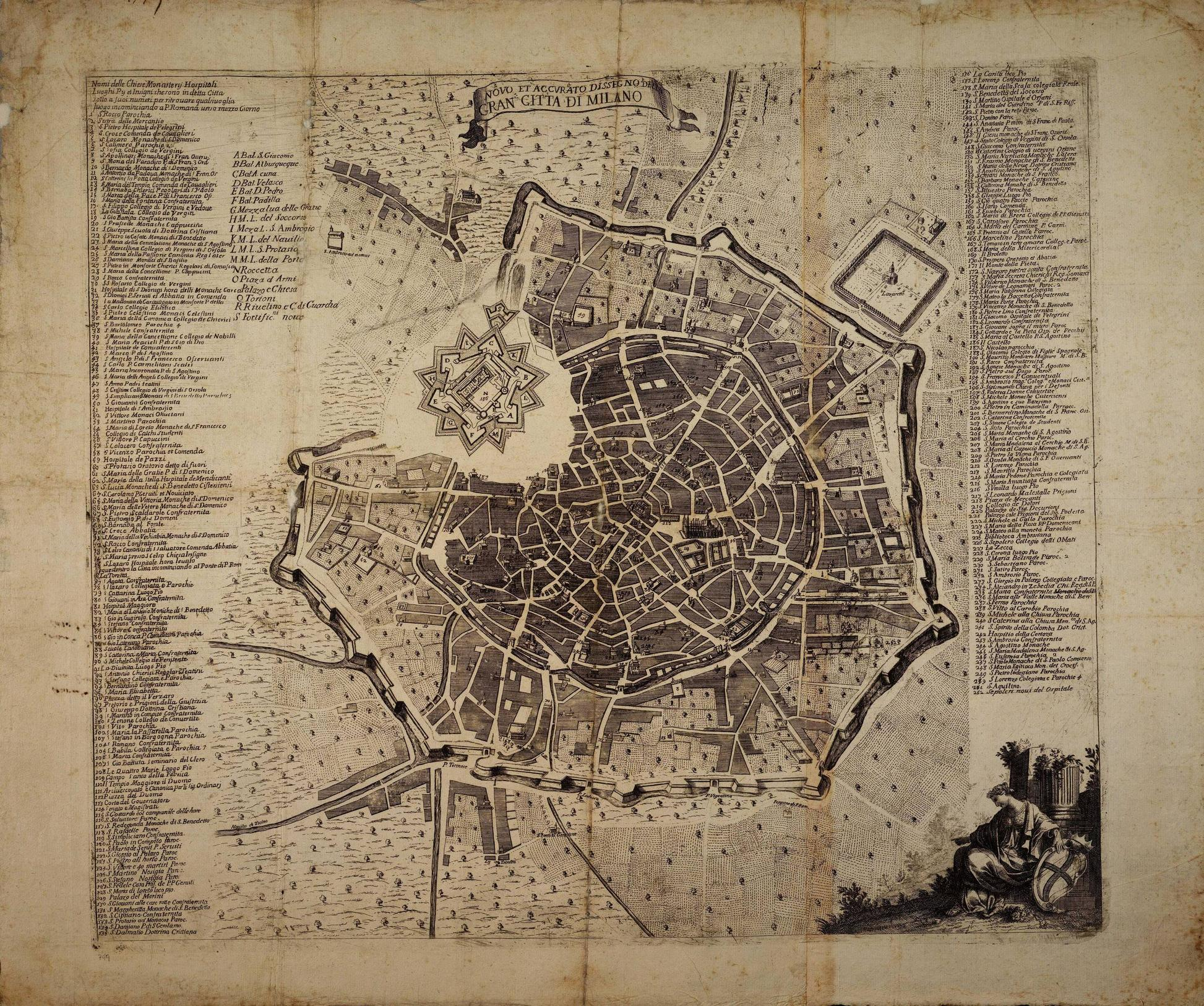 Mappa della città di Milano con l'elenco delle principali chiese e luoghi pii della città, 1730 circa